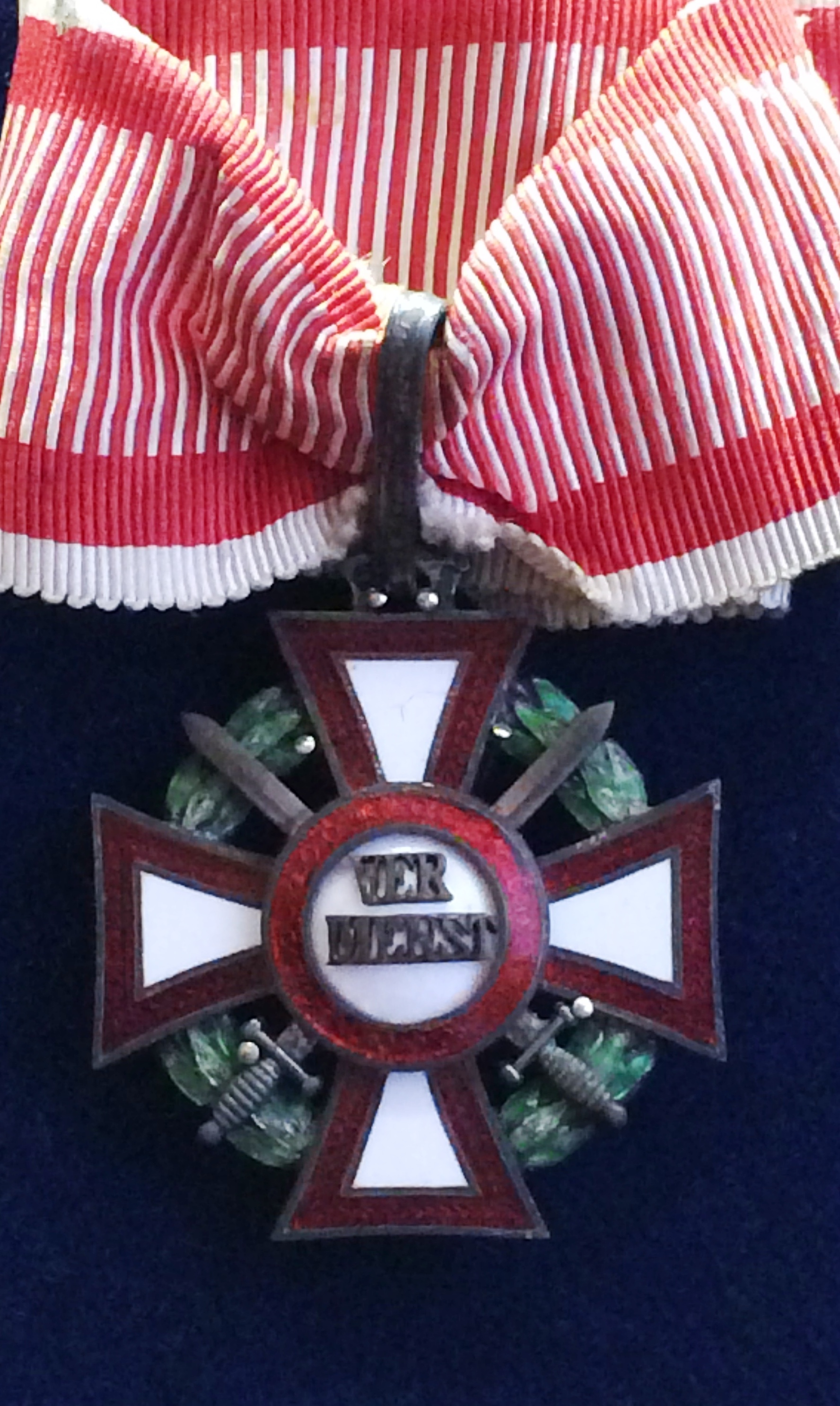 Österreichisches Miliärverdienstkreuz II. Klasse